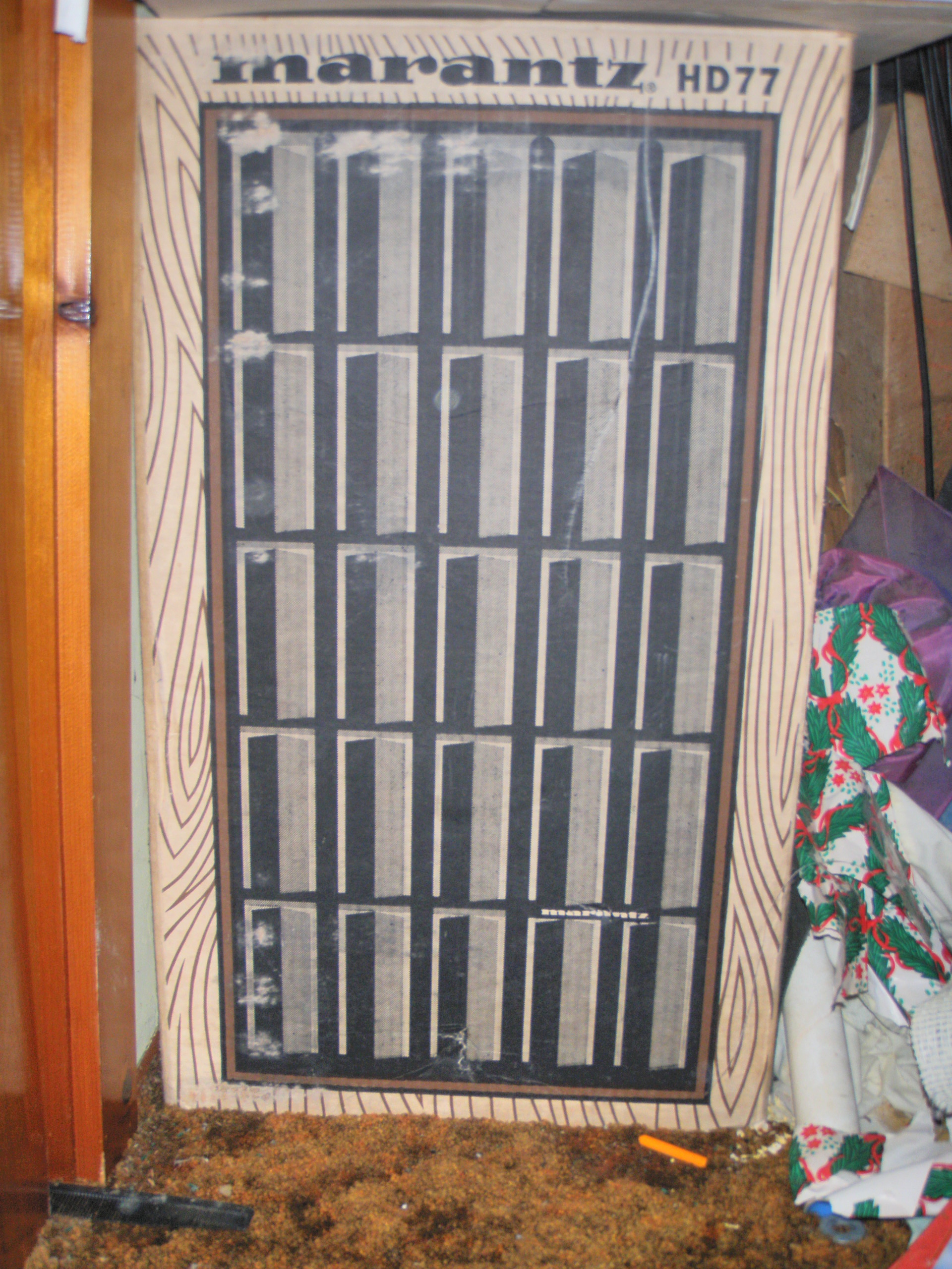 Marantz HD77 box